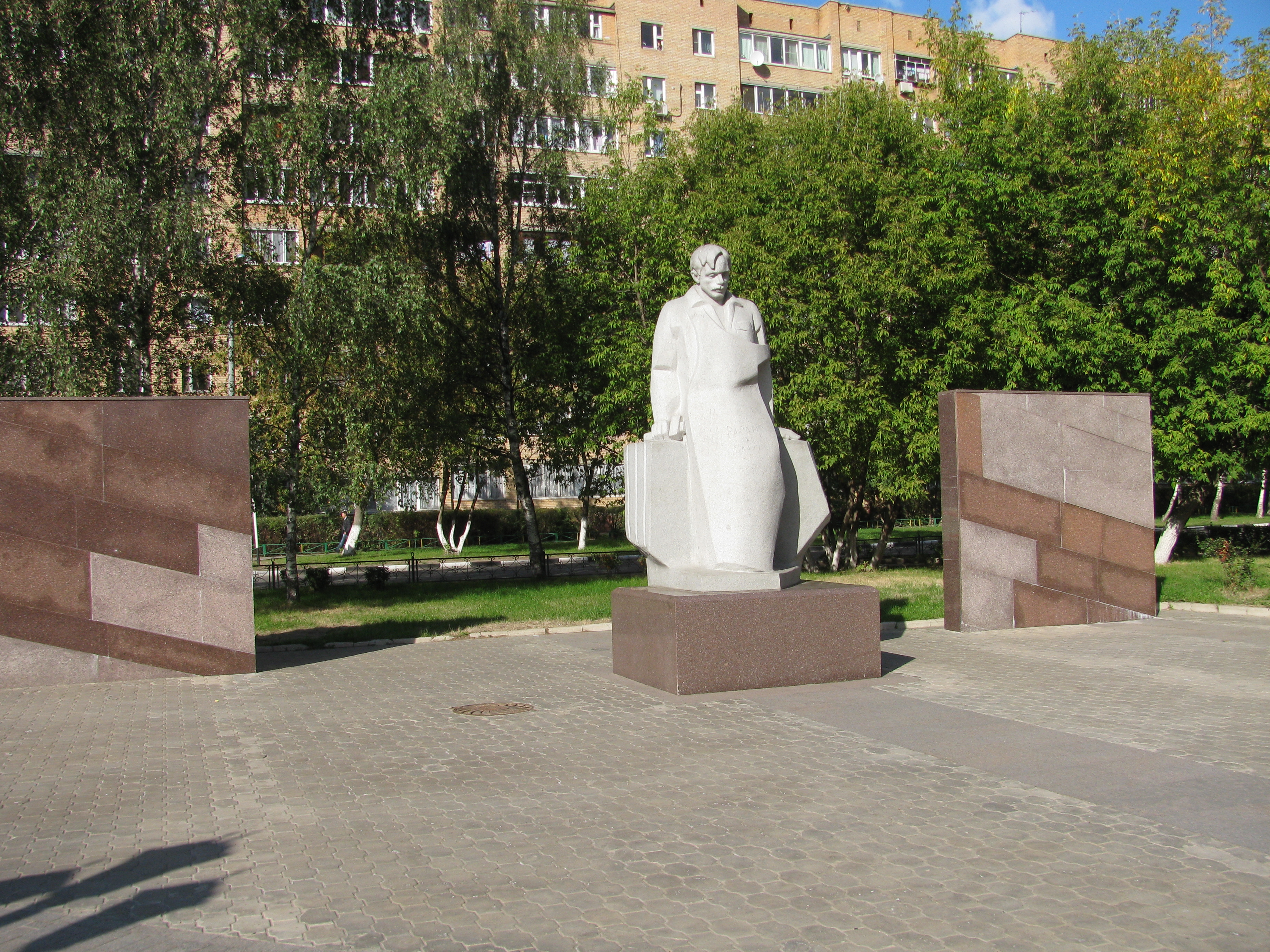 Dolgoprudny, Moscow Oblast, Russia